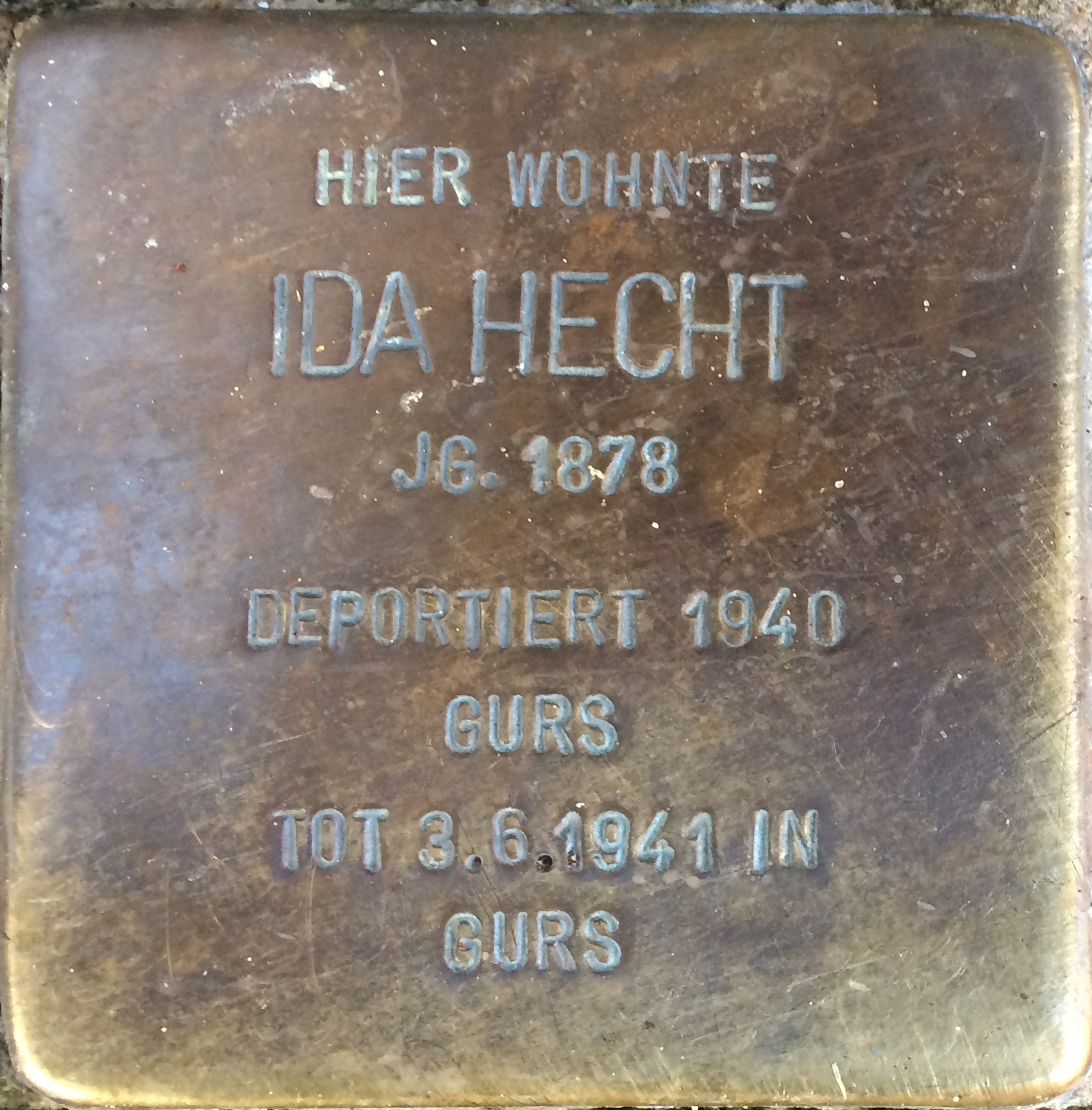 Stolperstein für IDA HECHT